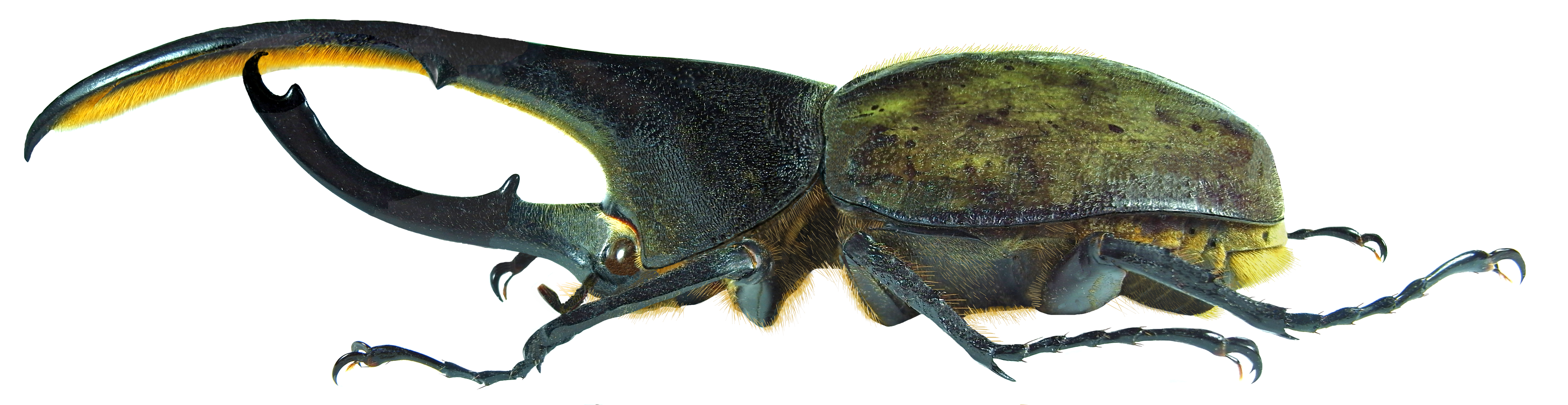 Family: Scarabaeidae (Dynastidae) Size: 138 mm Location: Venezuela, Rancho Grande, VIII.1973 det. U.Schmidt, 2000